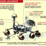 কিউরিওসিটির যন্ত্রপাতি